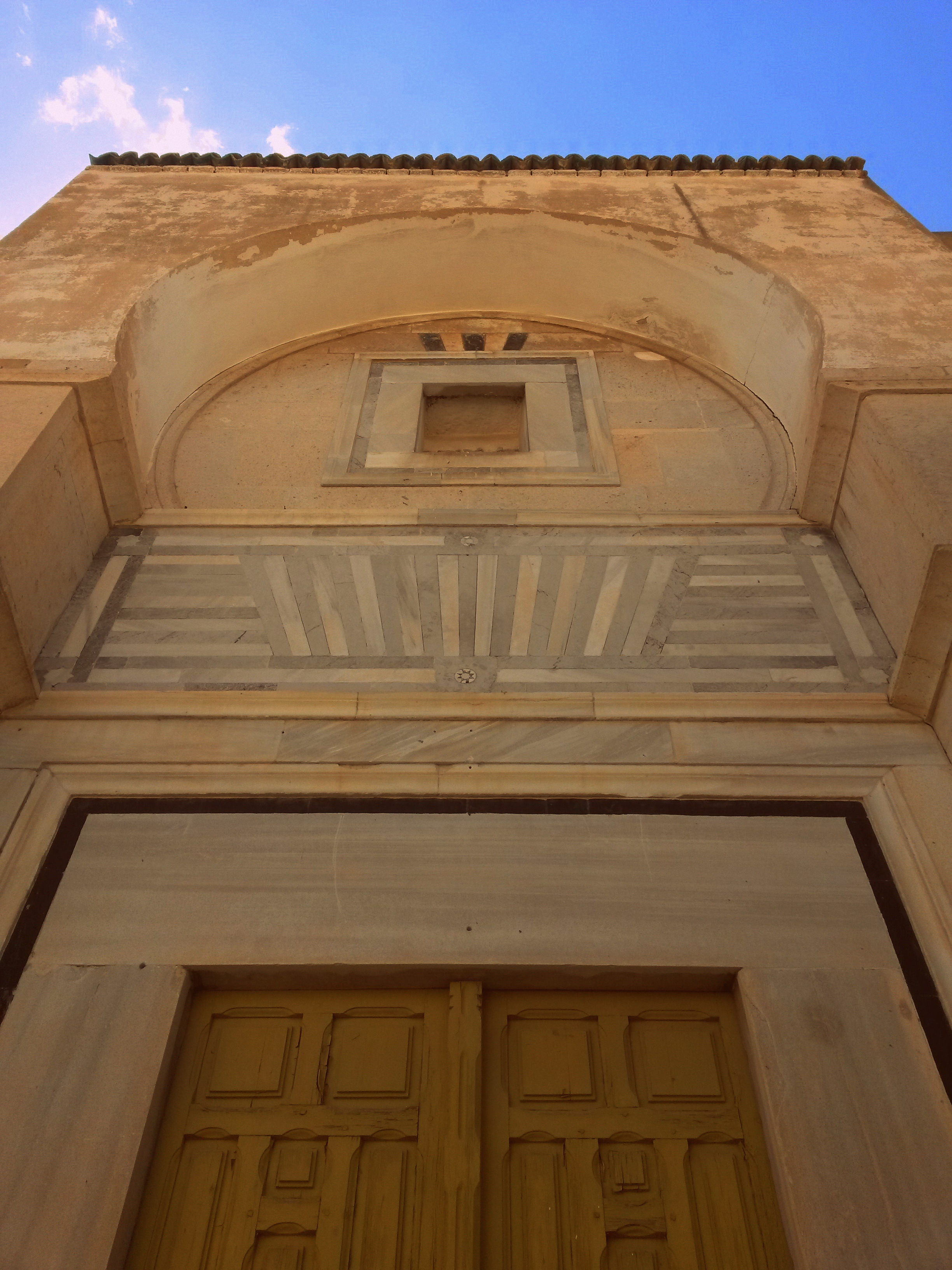 Midha Es-Soltane, Tunis